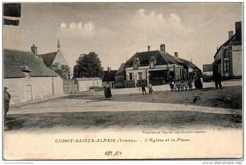 Cudot vers 1900.